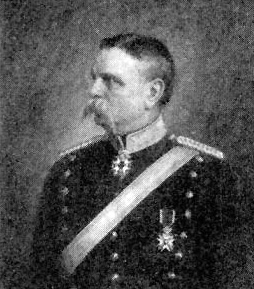 Georg Liljenroth (1841–1912).